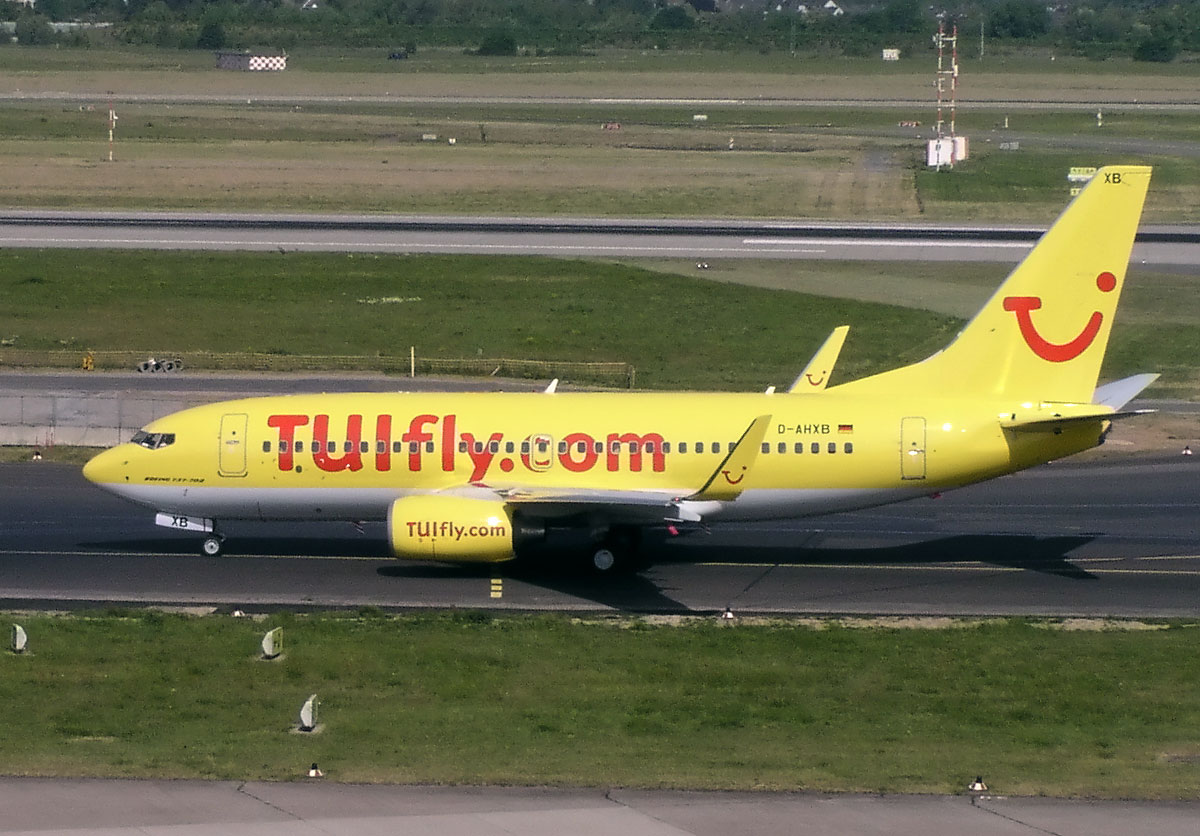 TUIfly Boeing 737-700 (D-AHXB) in Düsseldorf (EDDL/DUS)